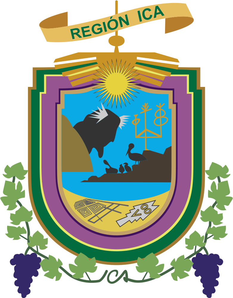 Escudo Región Ica